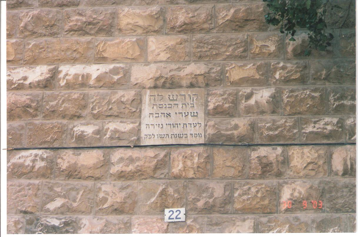 לוח שיש המציין כי בית הכנסת נבנה ע"י יהודי גזירה